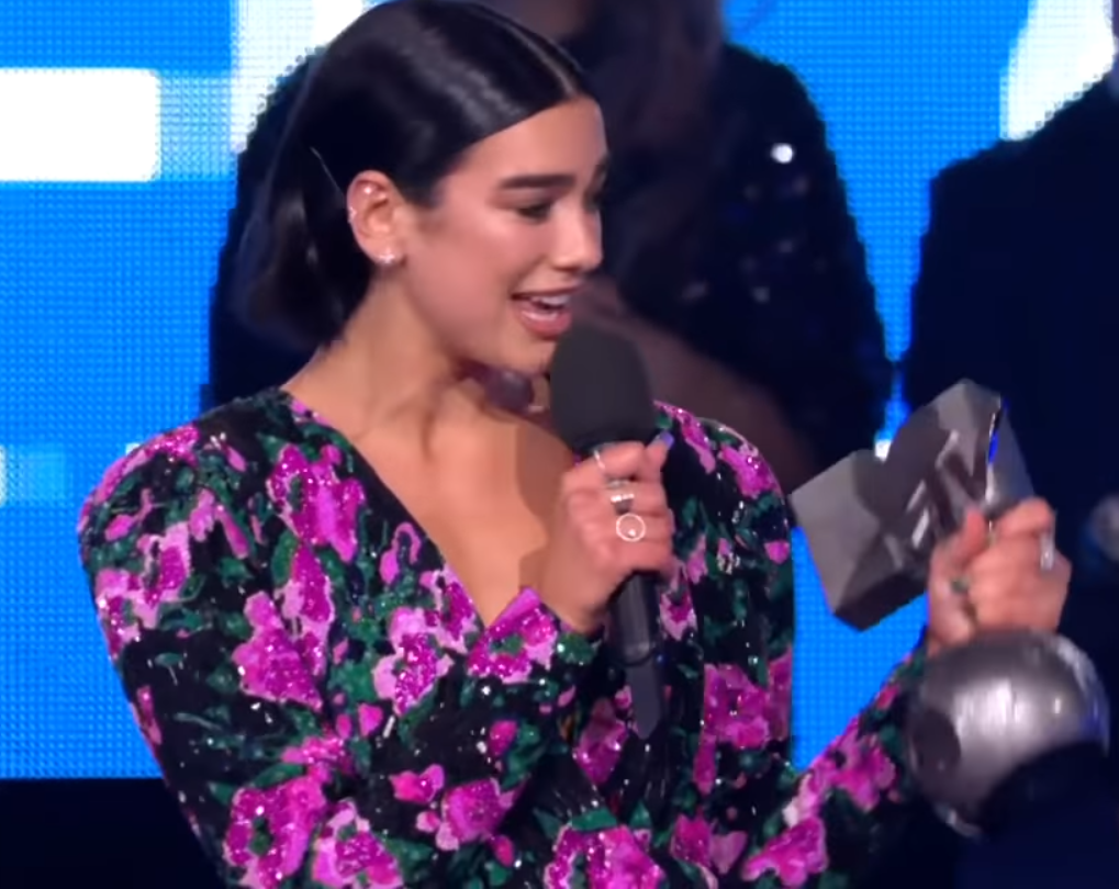 Dua Lipa Accepts Best Pop Award at the MTV European Music Awards 2018.